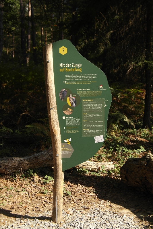 Eine Infotafel des Bienenlehrpfades am Hüppelröttchen